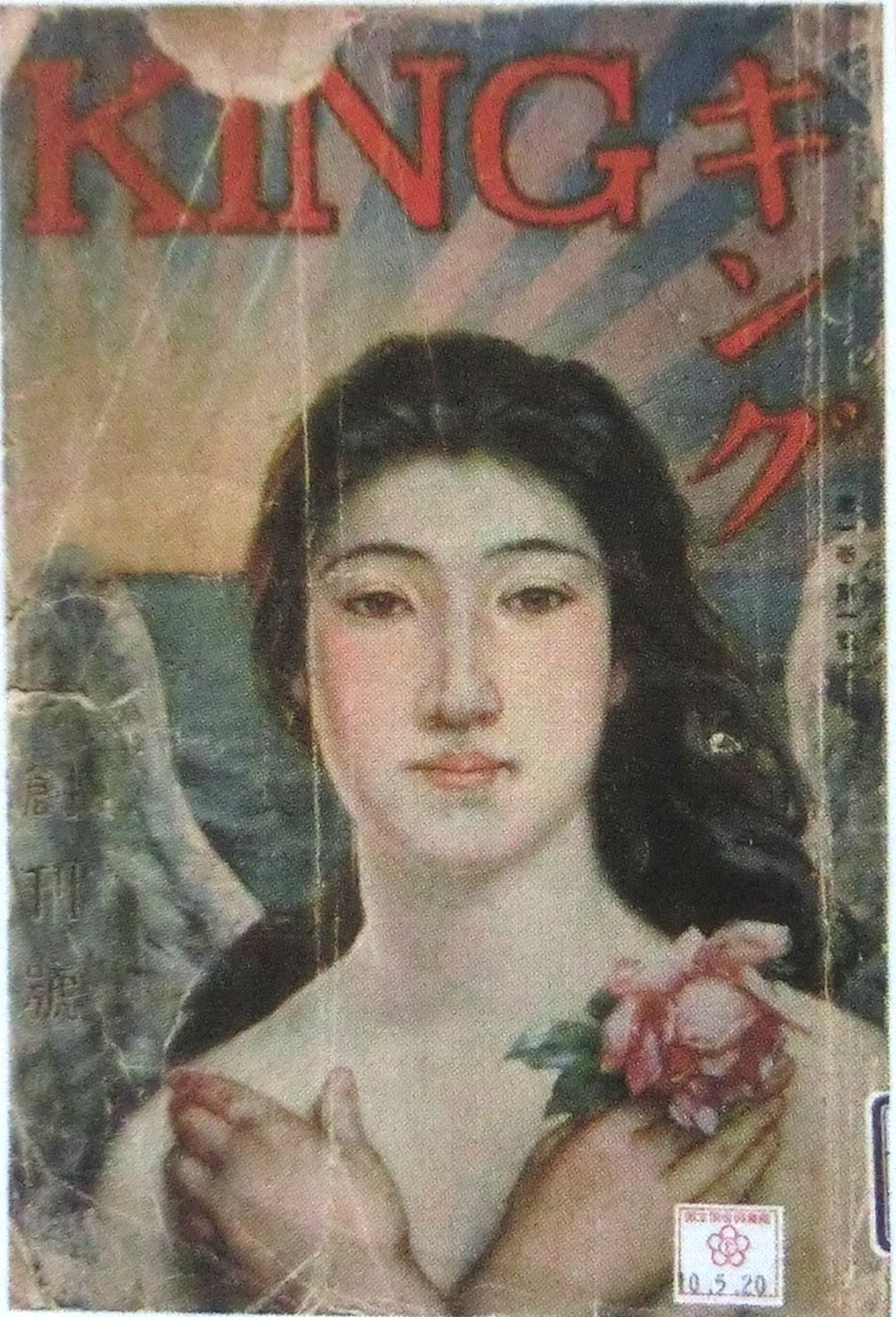 キング 1巻1号 大正14年(1925年）1月、大日本雄弁会講談社